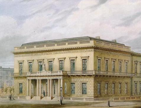 Athenaeum Club in London Anonyme Zeichnung, 1830er Jahre